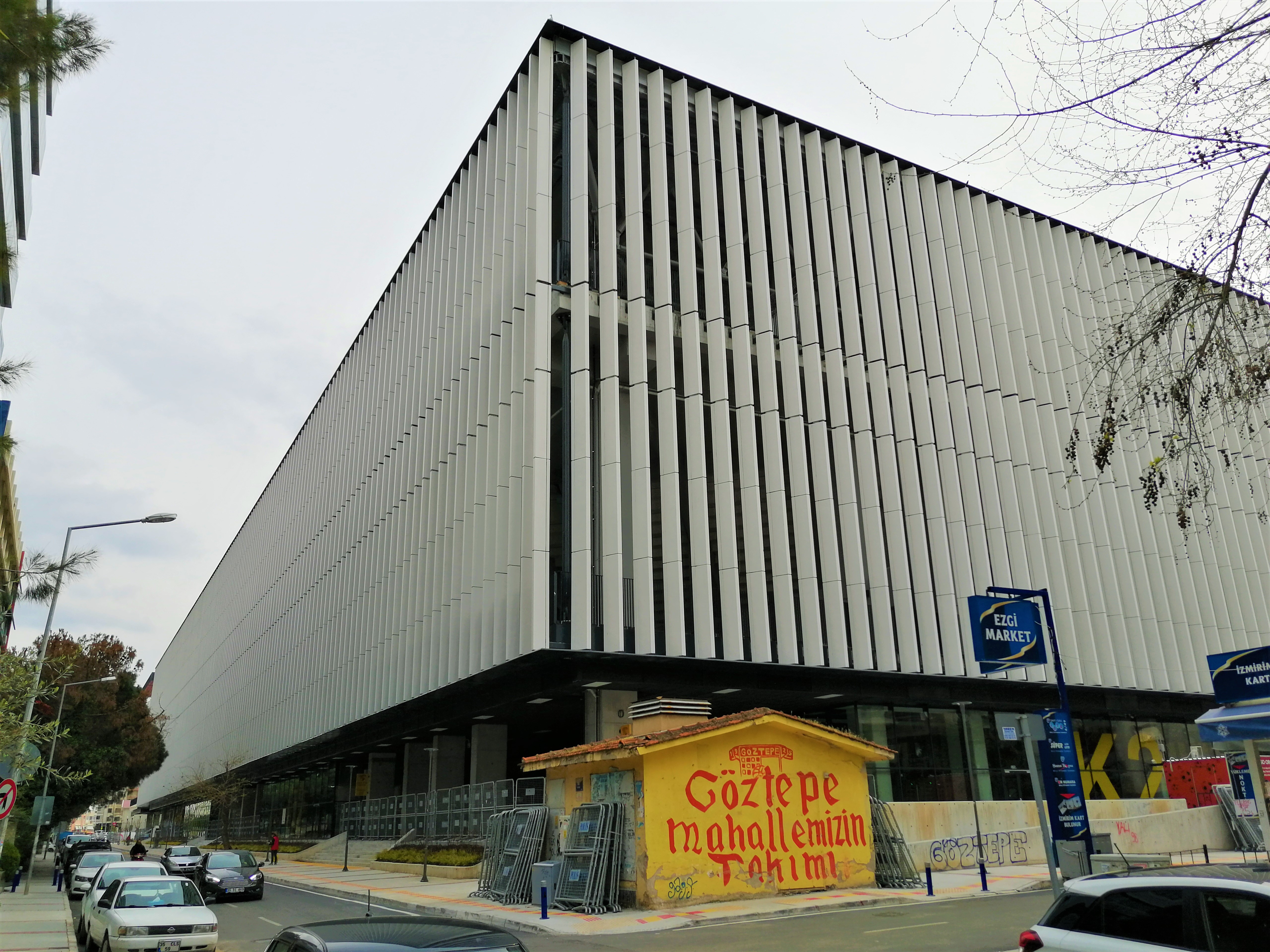 Gürsel Aksel Spor ve Sağlıklı Yaşam Merkezi, Göztepe Stadyumu, 2020